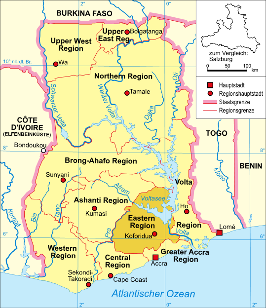 Politische Karte Ghanas (Eastern Region hervorgehoben)